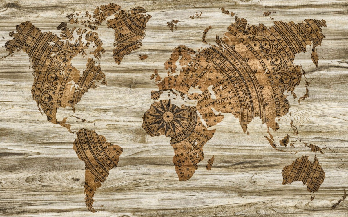 Madeira, textura, bússola, papel, mapa, mundo, escultura, arte, fundo, esboço, criatividade, escultura, em formação, mitologia, história antiga.